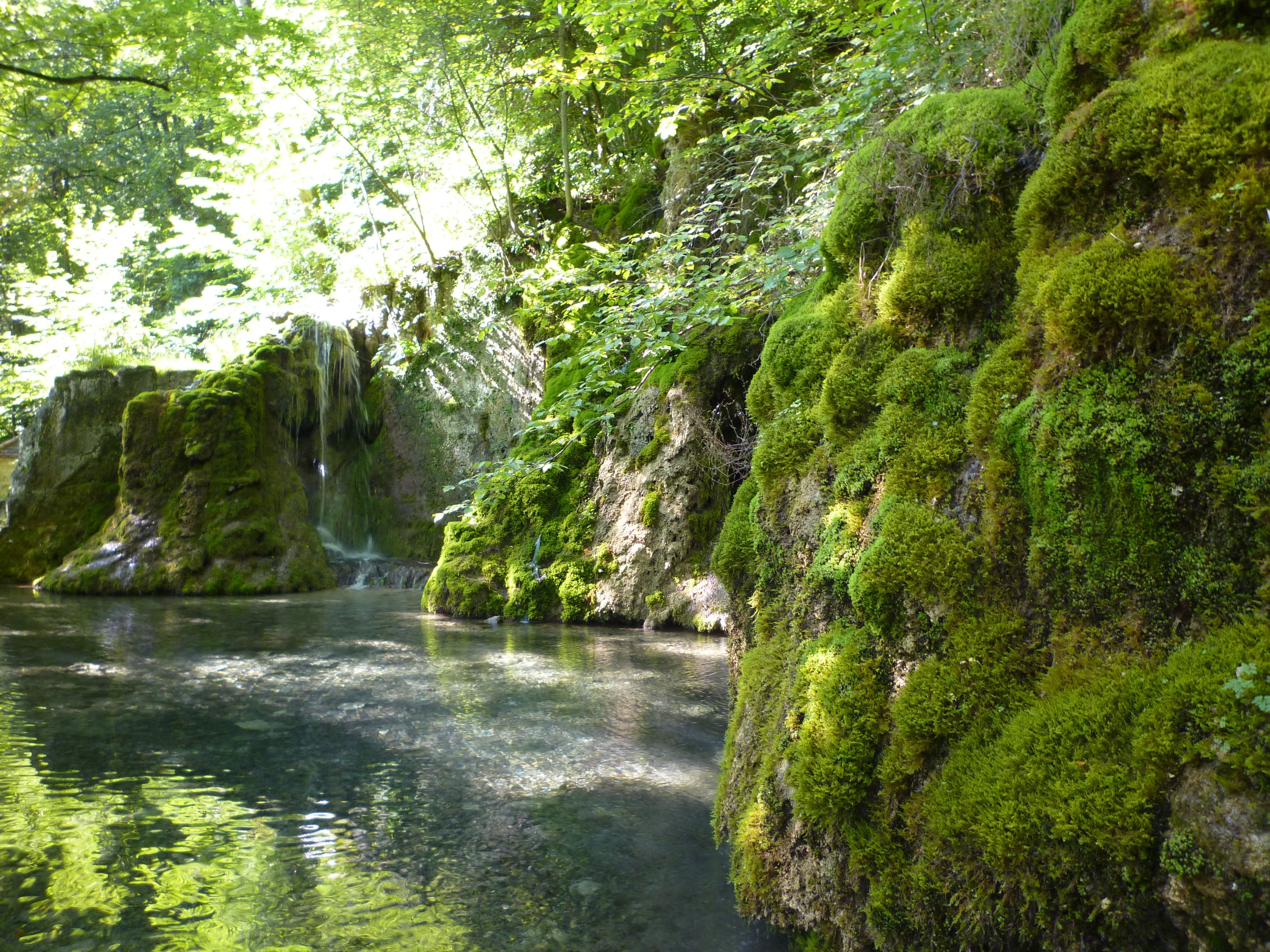 Bad Urach - Gütersteiner Wasserfall 625 Hm ü.N.N._03.jpg